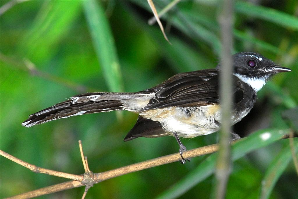 Pied Fantail (Rhipidura javanica)